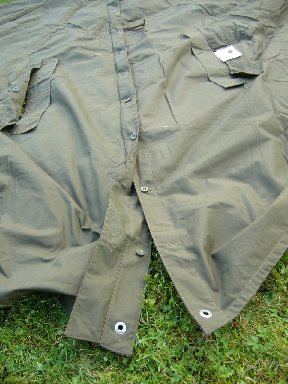 This is the way to buttoning the two tarpaulins, i guess. Lay Both tarpaulins with the inner side up on the ground, so you will get a 2/3 circle or octogon. One of the edges is doubled. So you first button the button holes of the right tarpaulin onto the buttons of the left tarpaulin. Then you button the button holes of the left tarpaulin onto the buttons. Now there is a windthight connection. So werden (vermutlich) die Zeltbahnen zusammengeknöpft. Beide Zeltbahnen mit der Innenseite nach oben passend zusammenlegen, so dass sich ein 2/3 Kreis (na gut, Achteck) bildet. Eine der Seiten ist "doppelt" ausgeführt. Zuerst knöpft man die Knopflöcher von der einen Zeltpahn auf die Knöpfe der anderen. Dann legt man die Falte der Zeltbahn mit den Knöpfen auf die schon eingeknöpfte Zeltbahn und verknöpft sie auch. Dadurch entsteht eine relativ winddichte Verbindung.